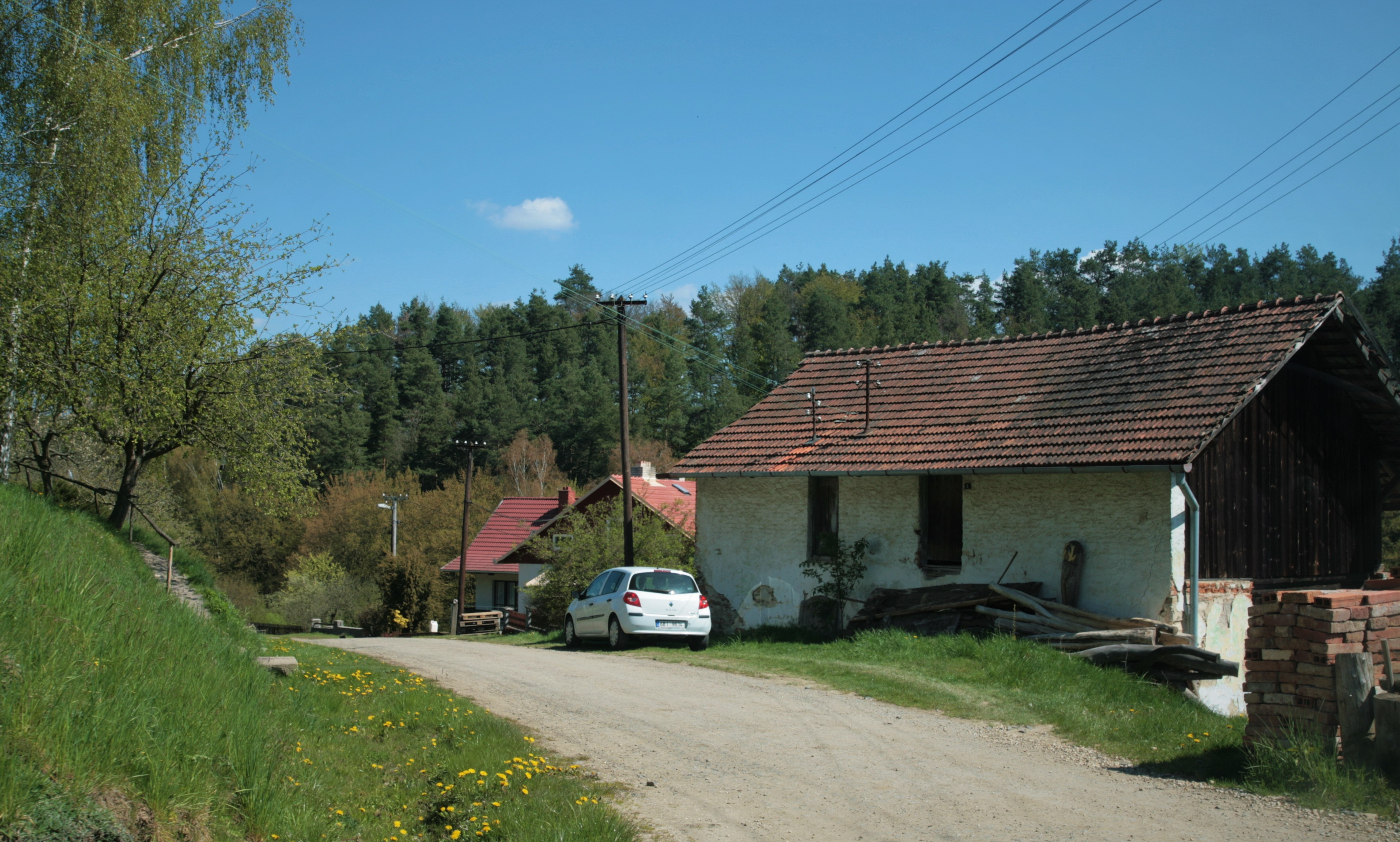 Osada Blahoňov, část obce Kuřimské Jestřabí v okrese Brno-venkov. Průhled osadou od jihu.